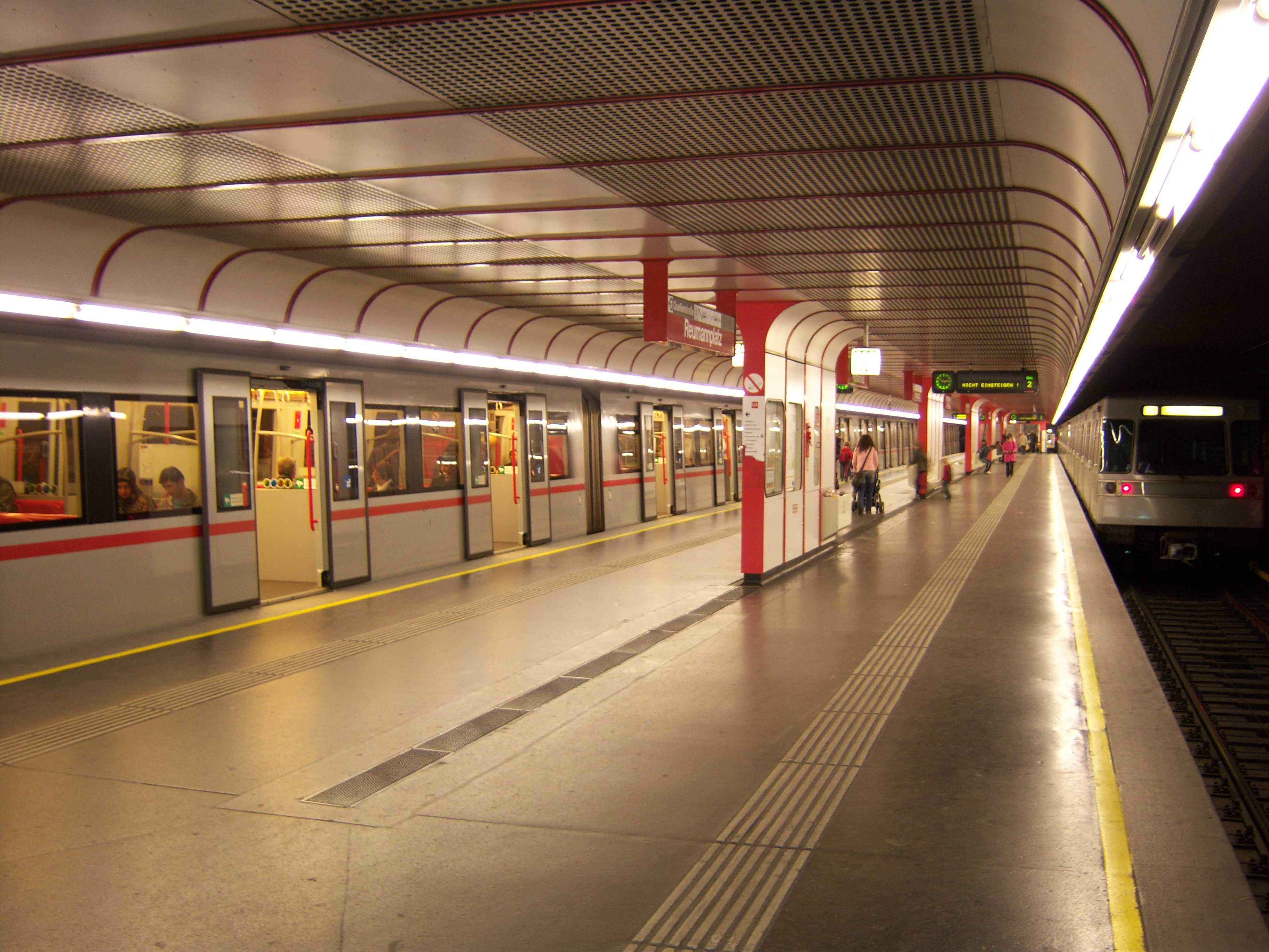 U-Bahn-Station Reumannplatz